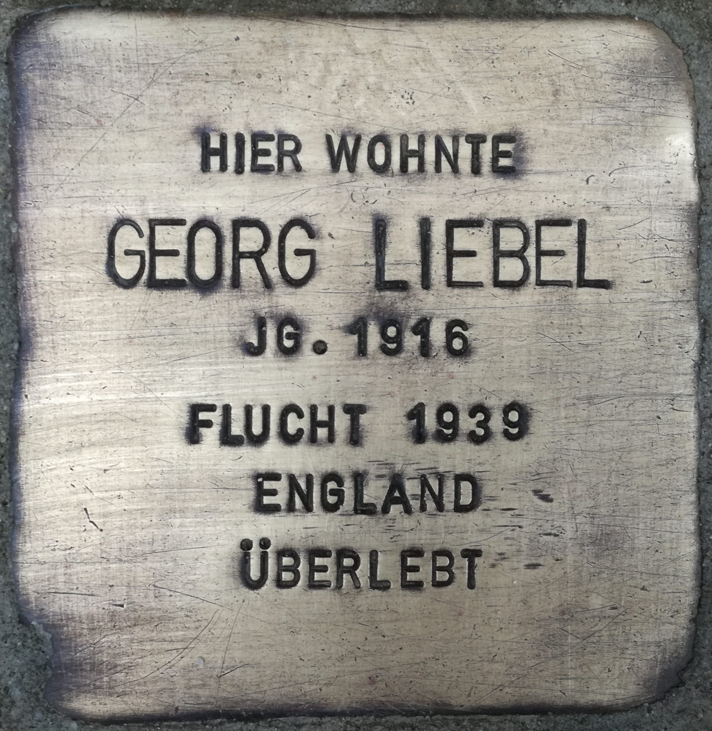 Hier wohnte Georg Liebel Jahrgang 1916 Flucht 1939 England überlebt